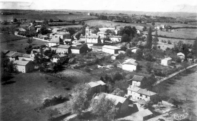 Culin en 1900. Carte postale ancienne.